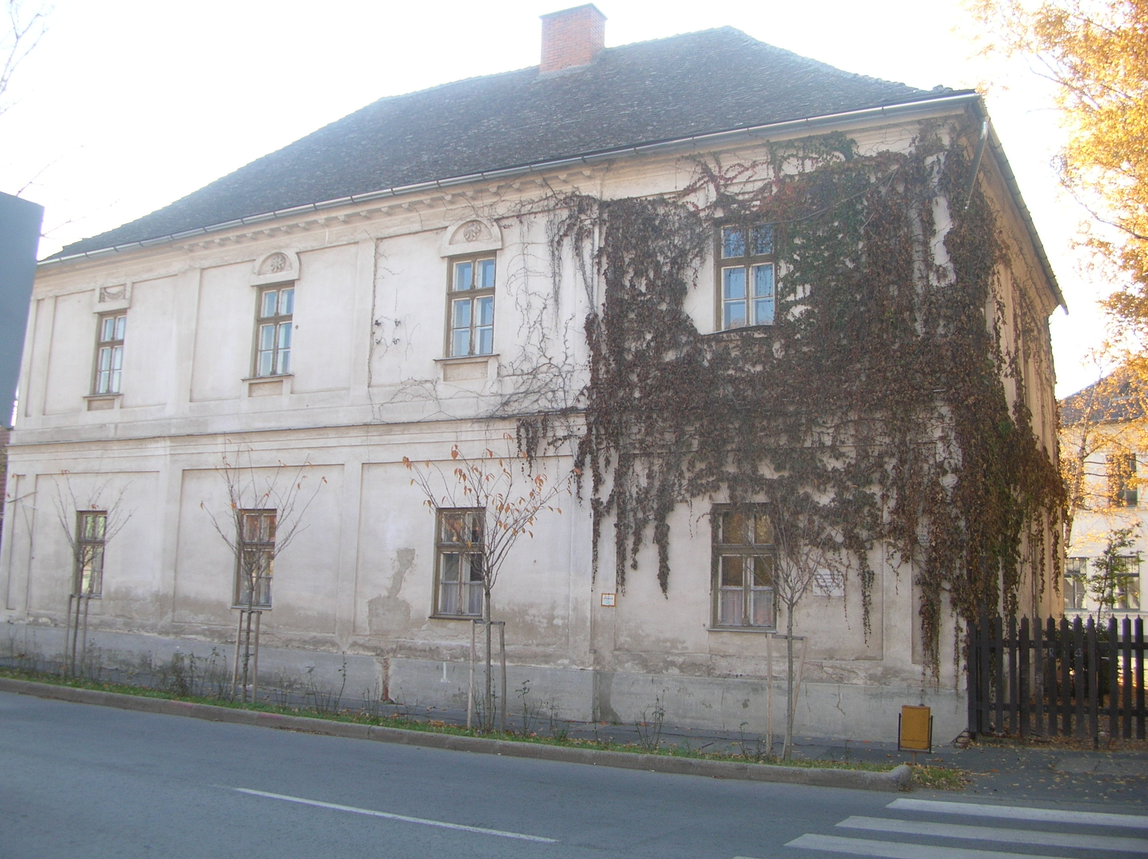 Makói belvárosi iskola, Bagolyvár